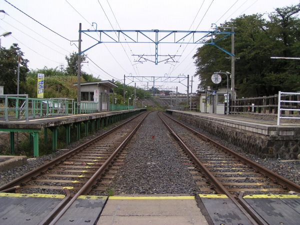 Mokichi Kinenkan-mae Station, Kaminoyama, Yamagata, Japan